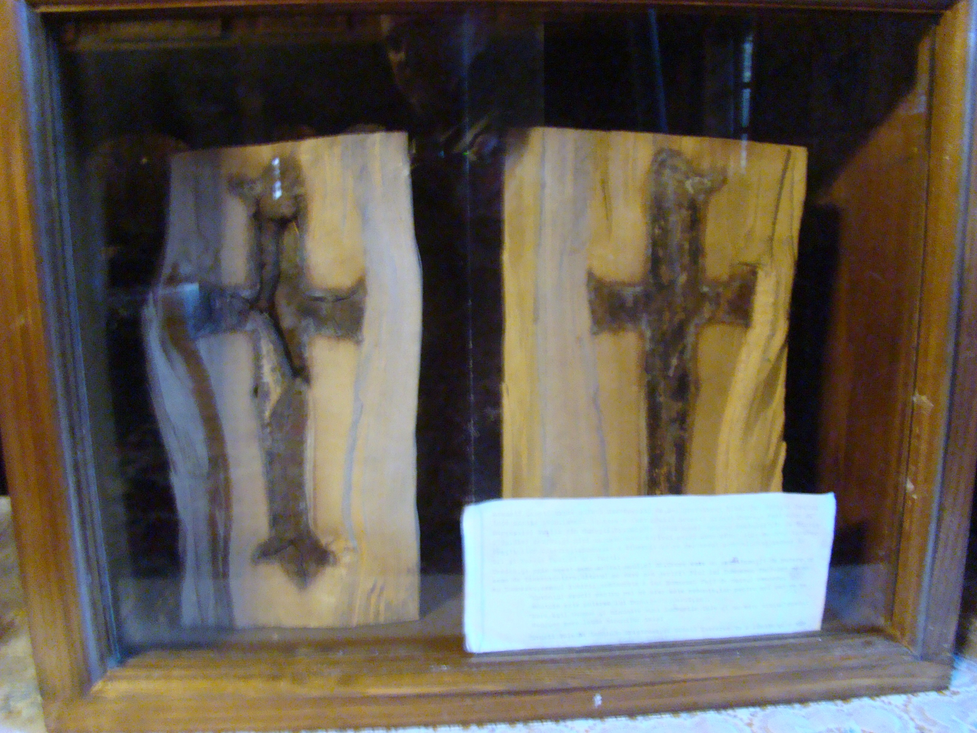 Biserica de lemn din Budești-Josani, județul Maramureș